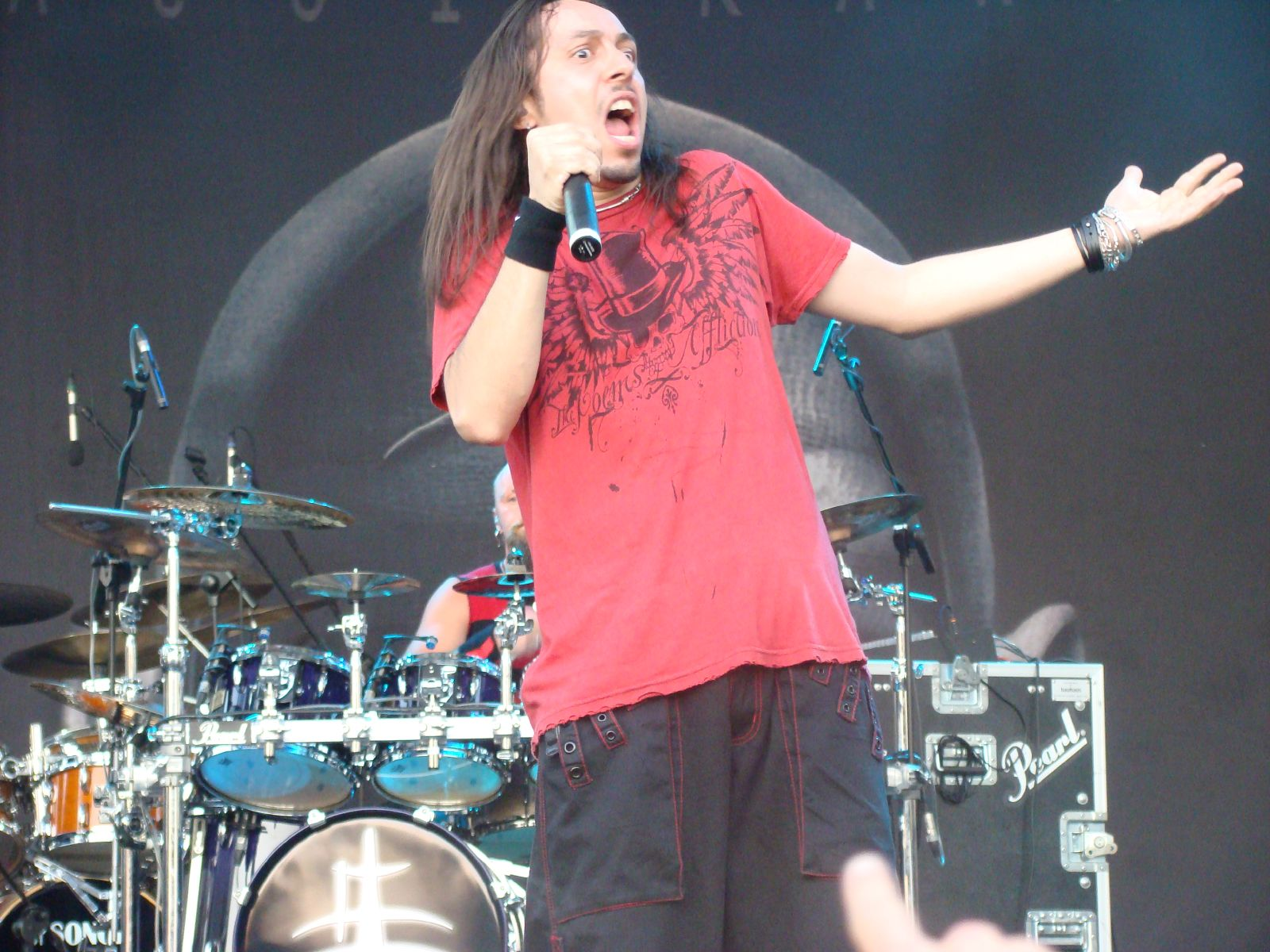 Andrea Ferro of Lacuna Coil